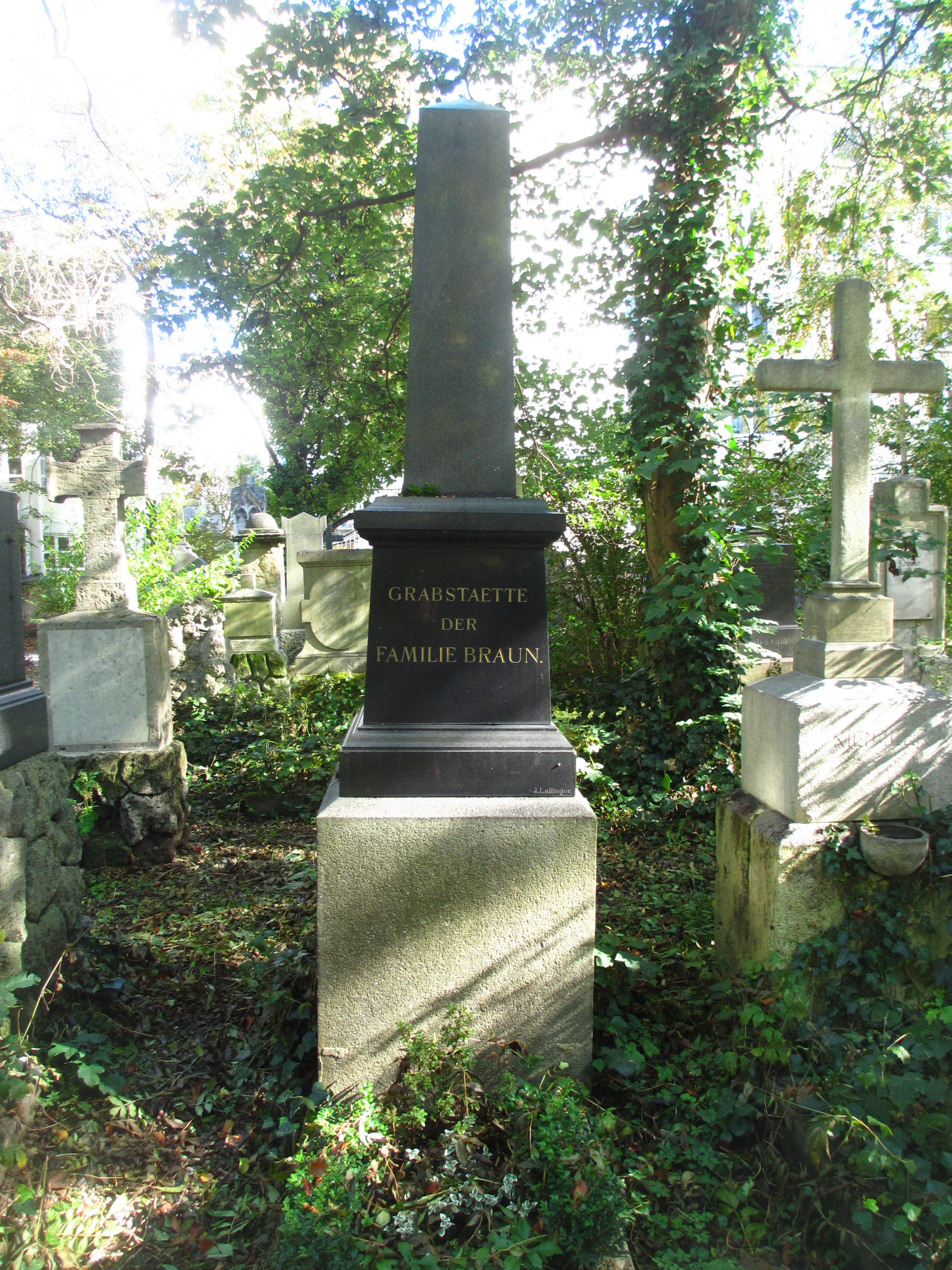 Grab von Kaspar Braun (1807-1877) auf dem Alten Suedlichen Friedhof in Muenchen-Graeberfeld GF-7-10-4-5